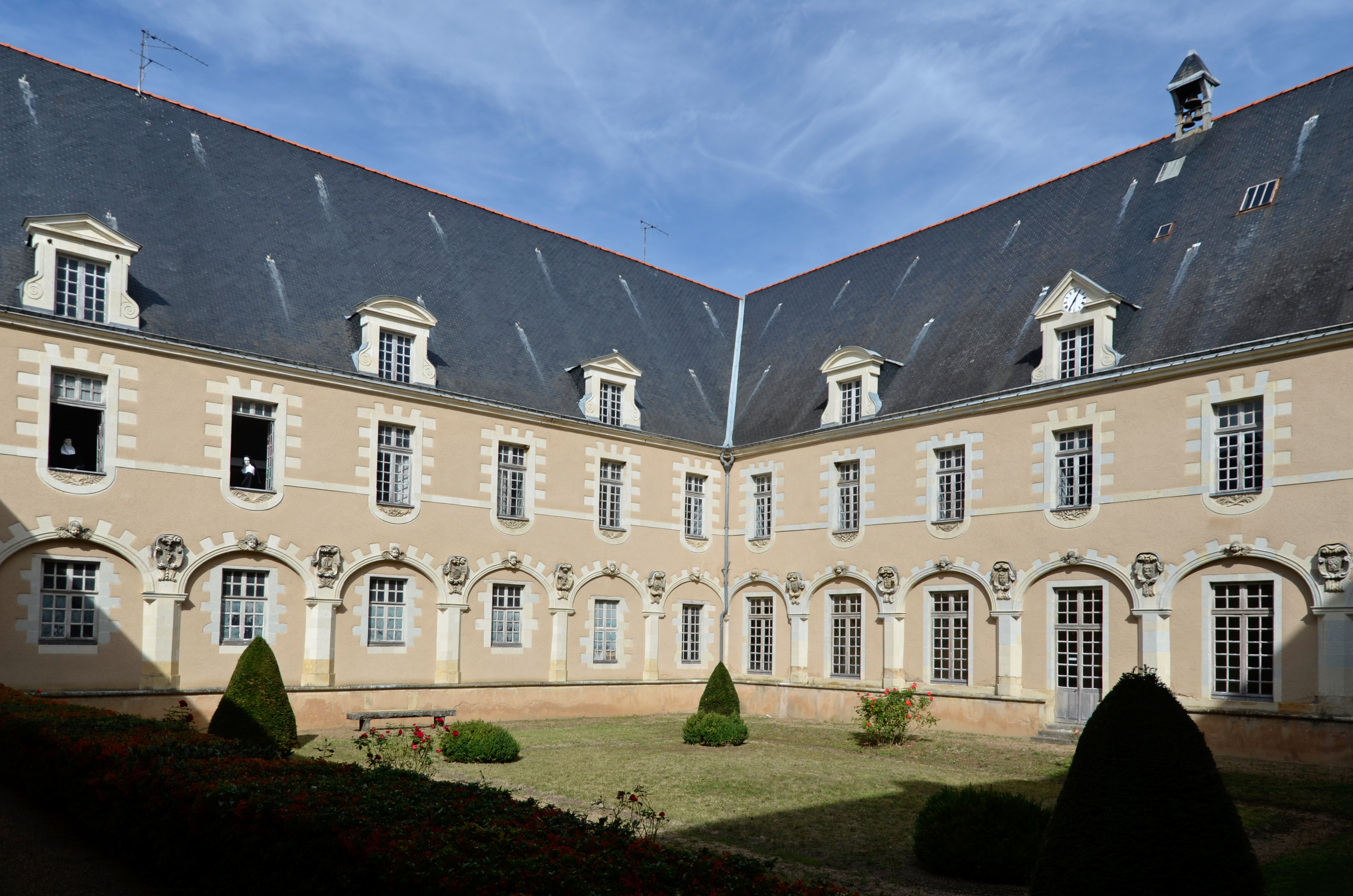 Monastère de la Visitation - La Flèche, Sarthe .